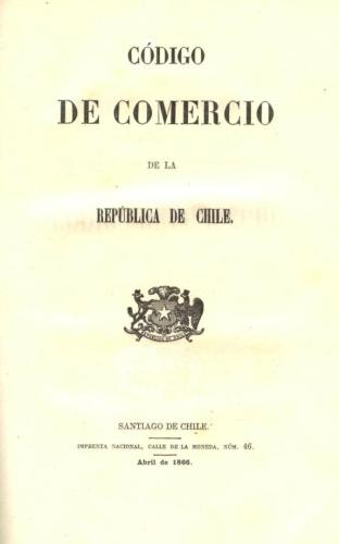 Portada del Código de Comercio de la República de Chile. Primera edición oficial